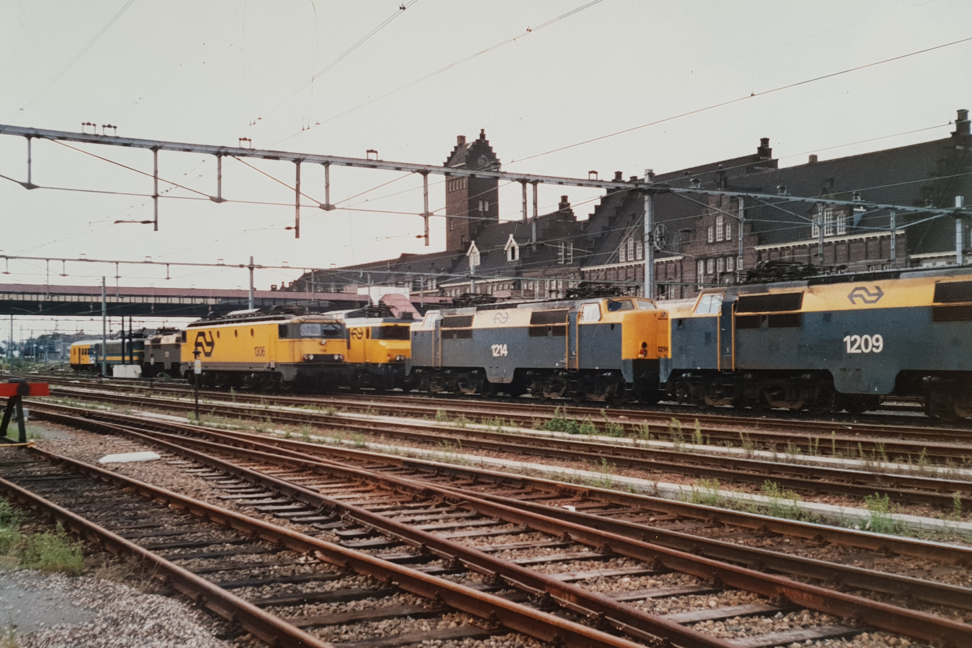 Station Maastricht met elektrische locomotieven uit de series 1300, 1600 en 1200 in 1988 (foto: Daniel van der Ree)